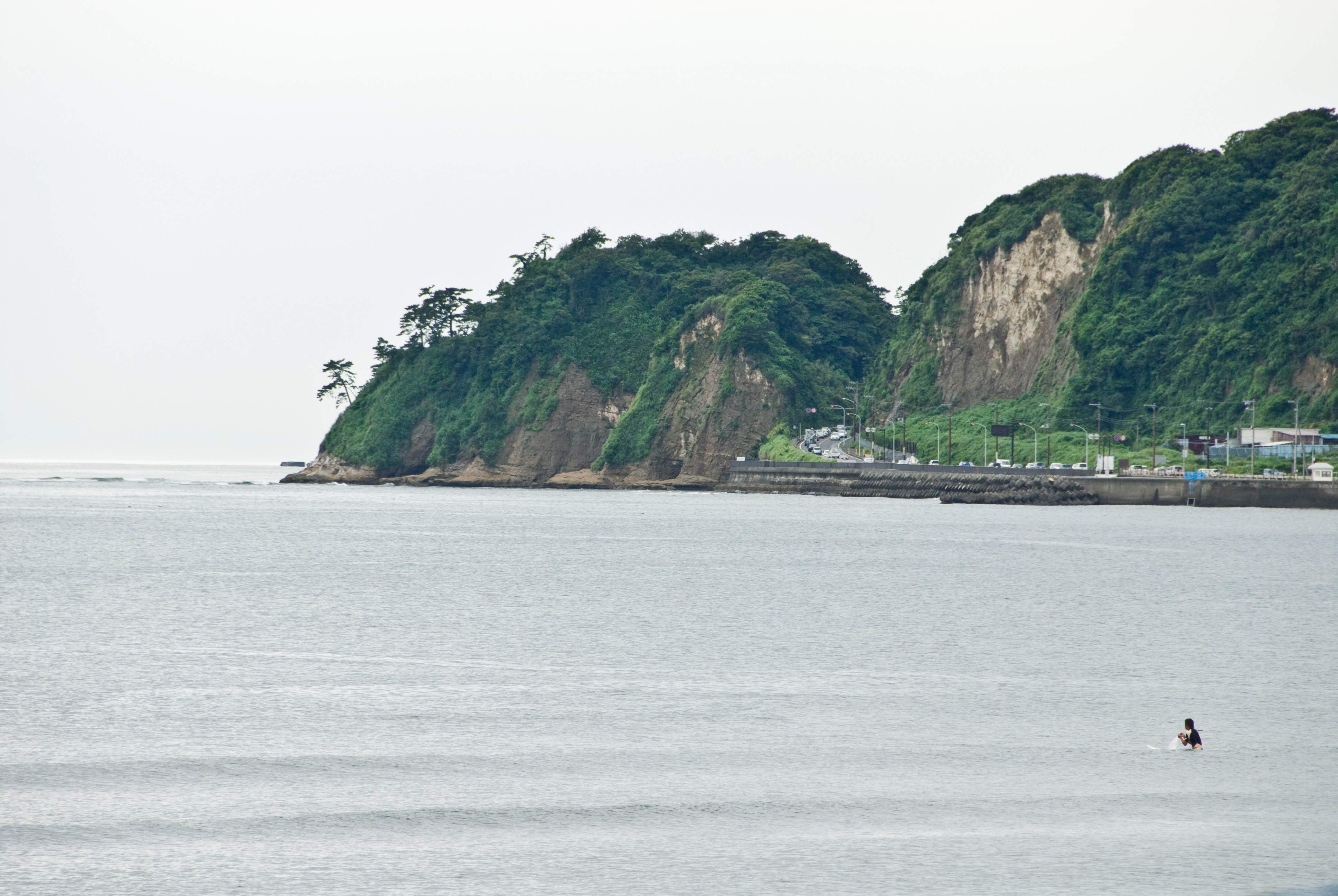 A photo of Inamuragasaki in Kamakura